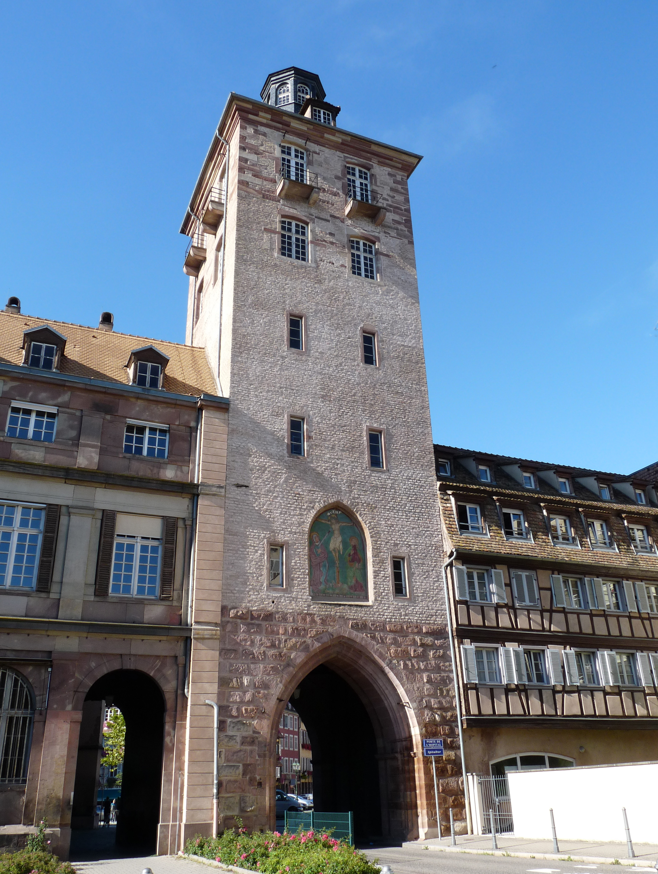 Porte de l'Hôpital (Strasbourg). XIIIe s., remaniée au XVIIe s. (observatoire) et au XIXe s. (lanternon).